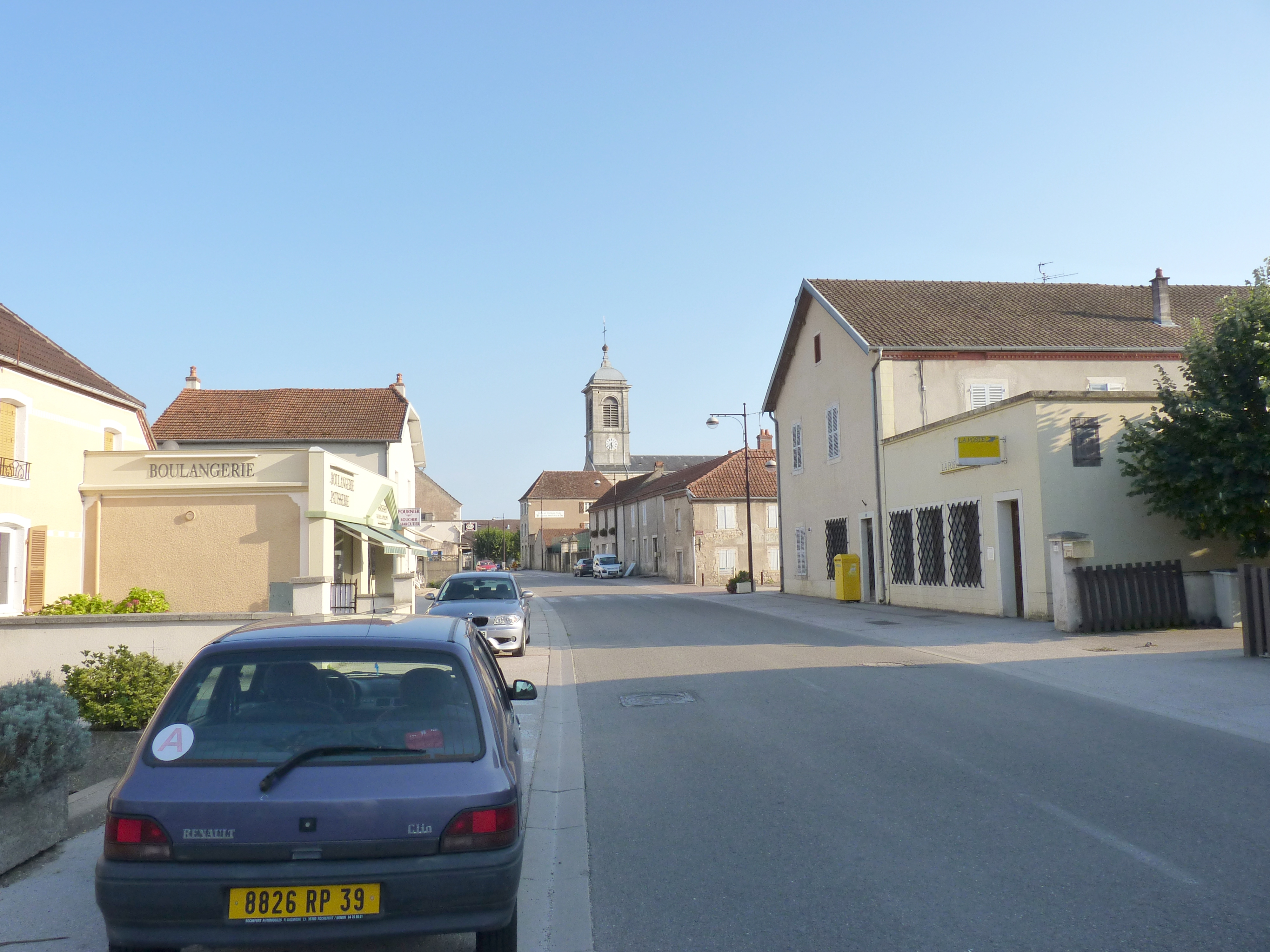 Grande rue à Saint-Aubin (Jura, Franche-Comté, France)